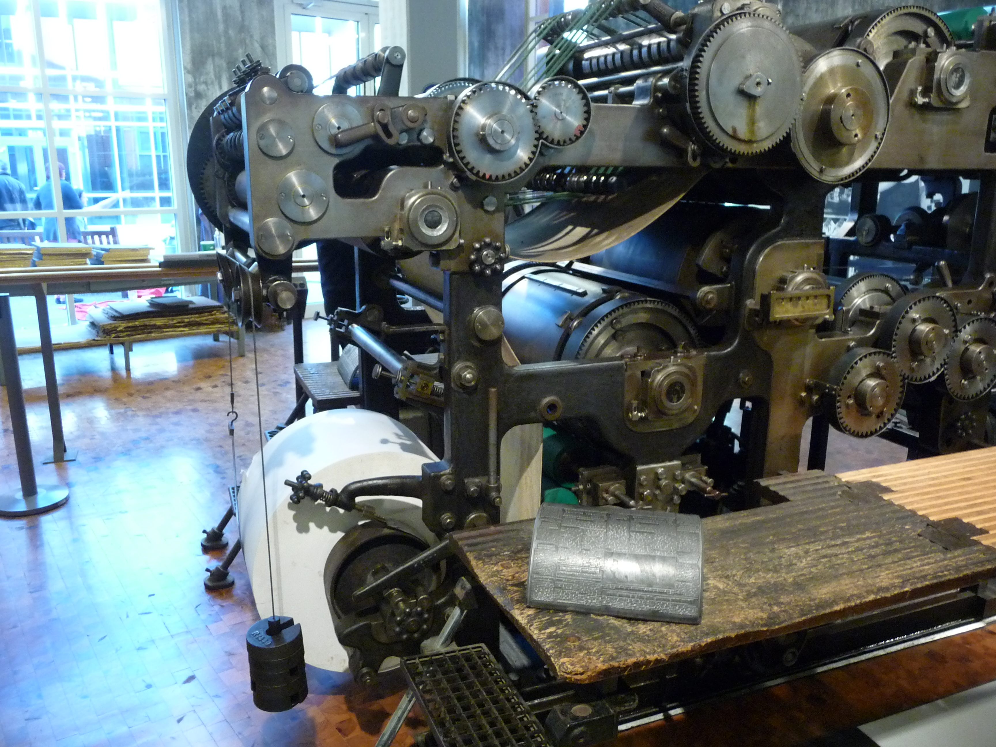 Rotations Druckpresse Ausstellungsstück der DASA in Dortmund